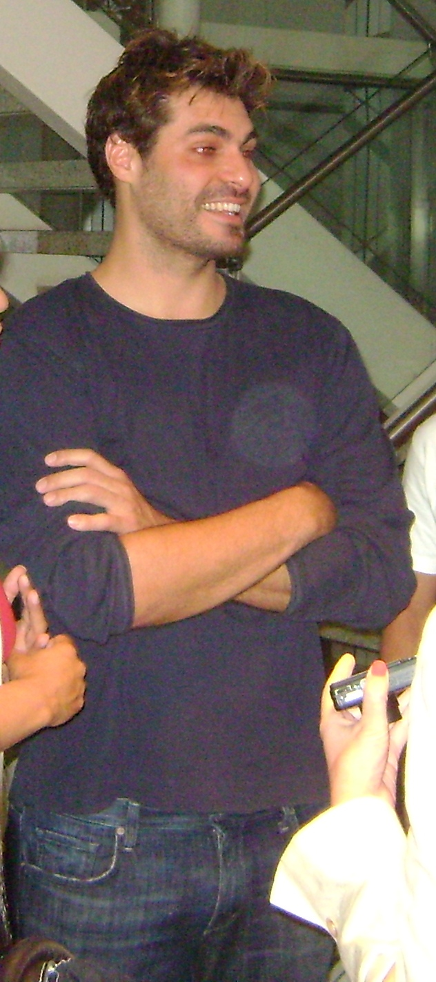 Thiago Lacerda, ator brasileiro, após a apresentação da peça "Calígula", em São Paulo.